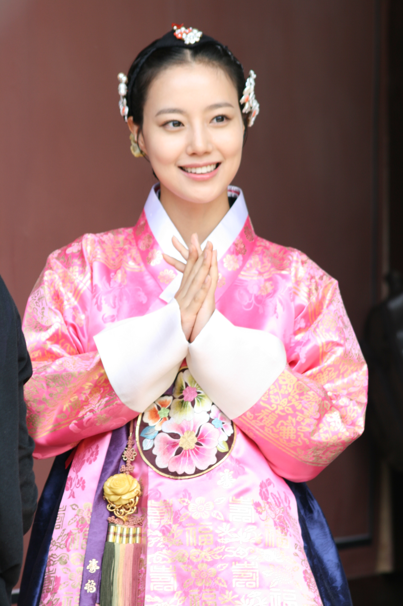 2011년 6월 28일 경복궁에서 진행된 KBS 수목드라마 《공주의 남자》 포스터 촬영.